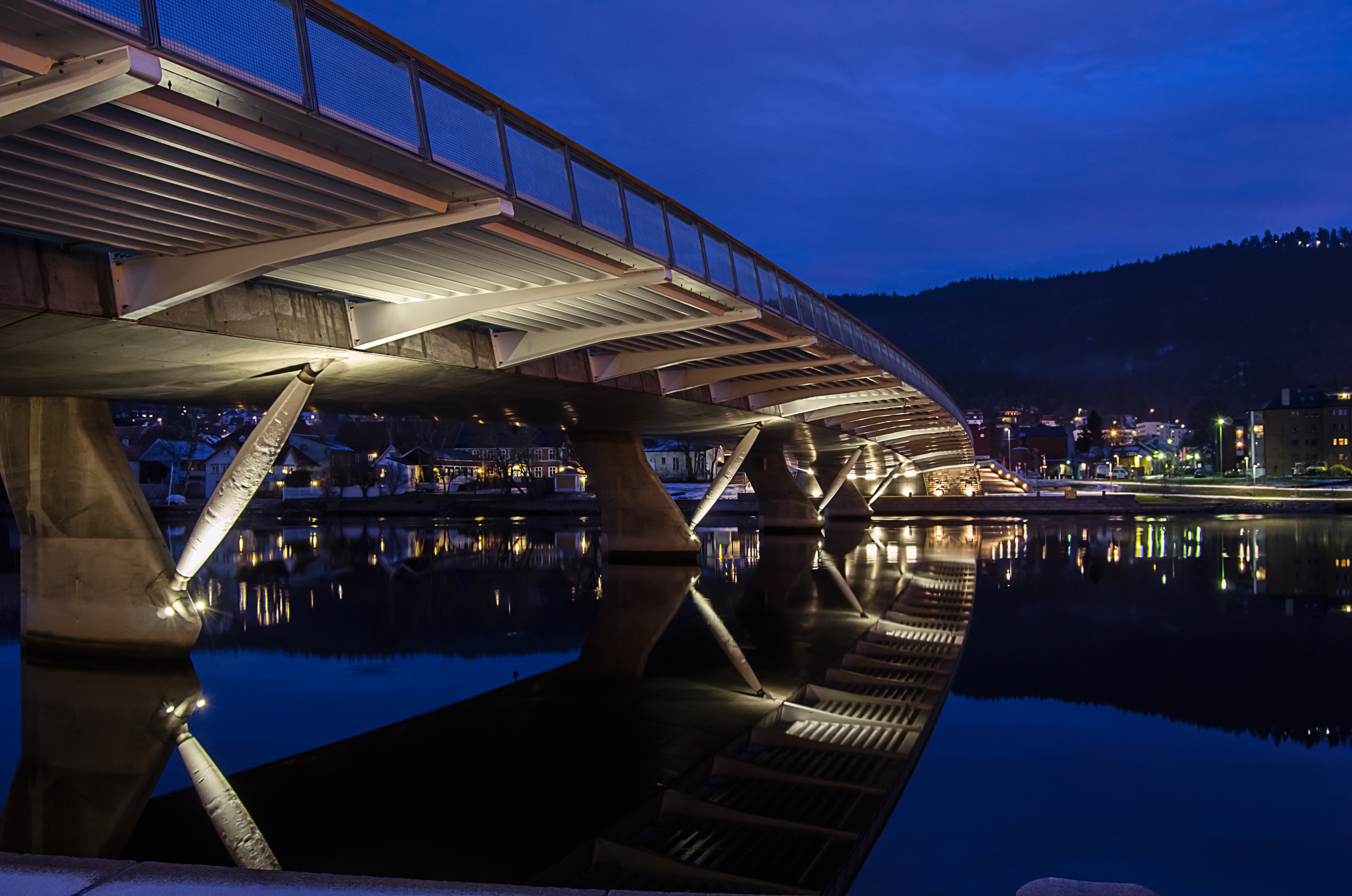 Øvre sund bru i Drammen fotografert i den blå timen.